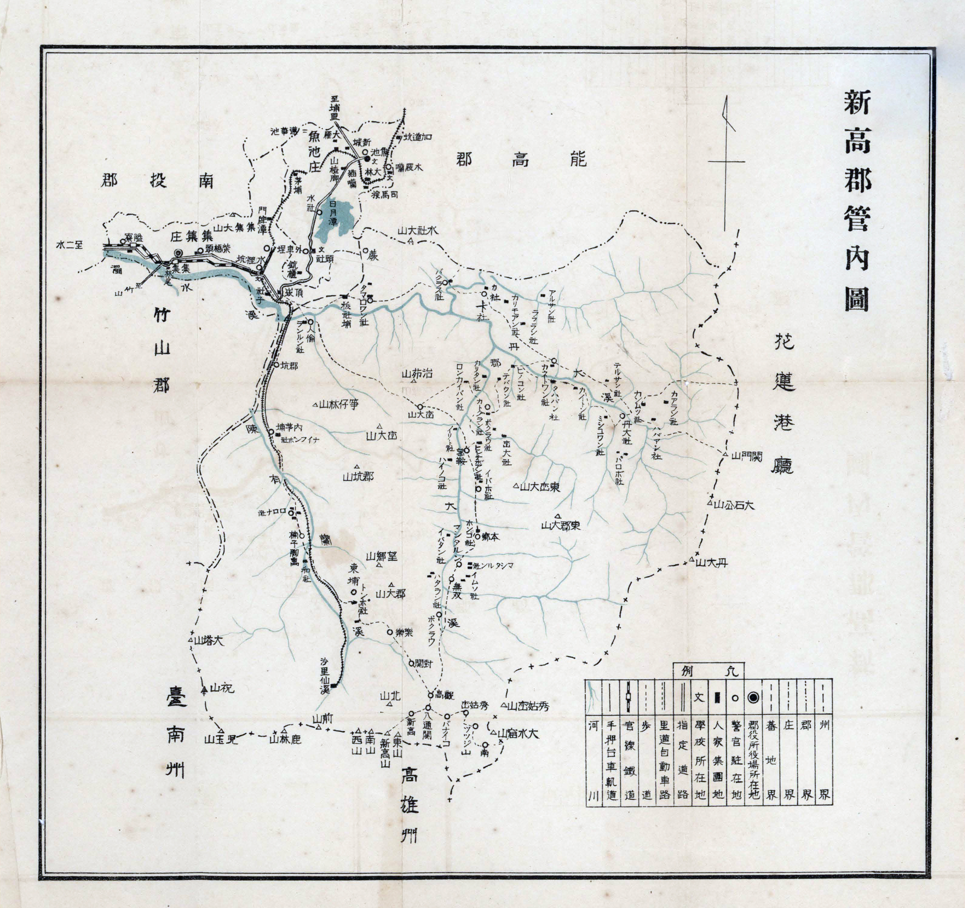 中文（台灣）: 臺中州新高郡管內圖